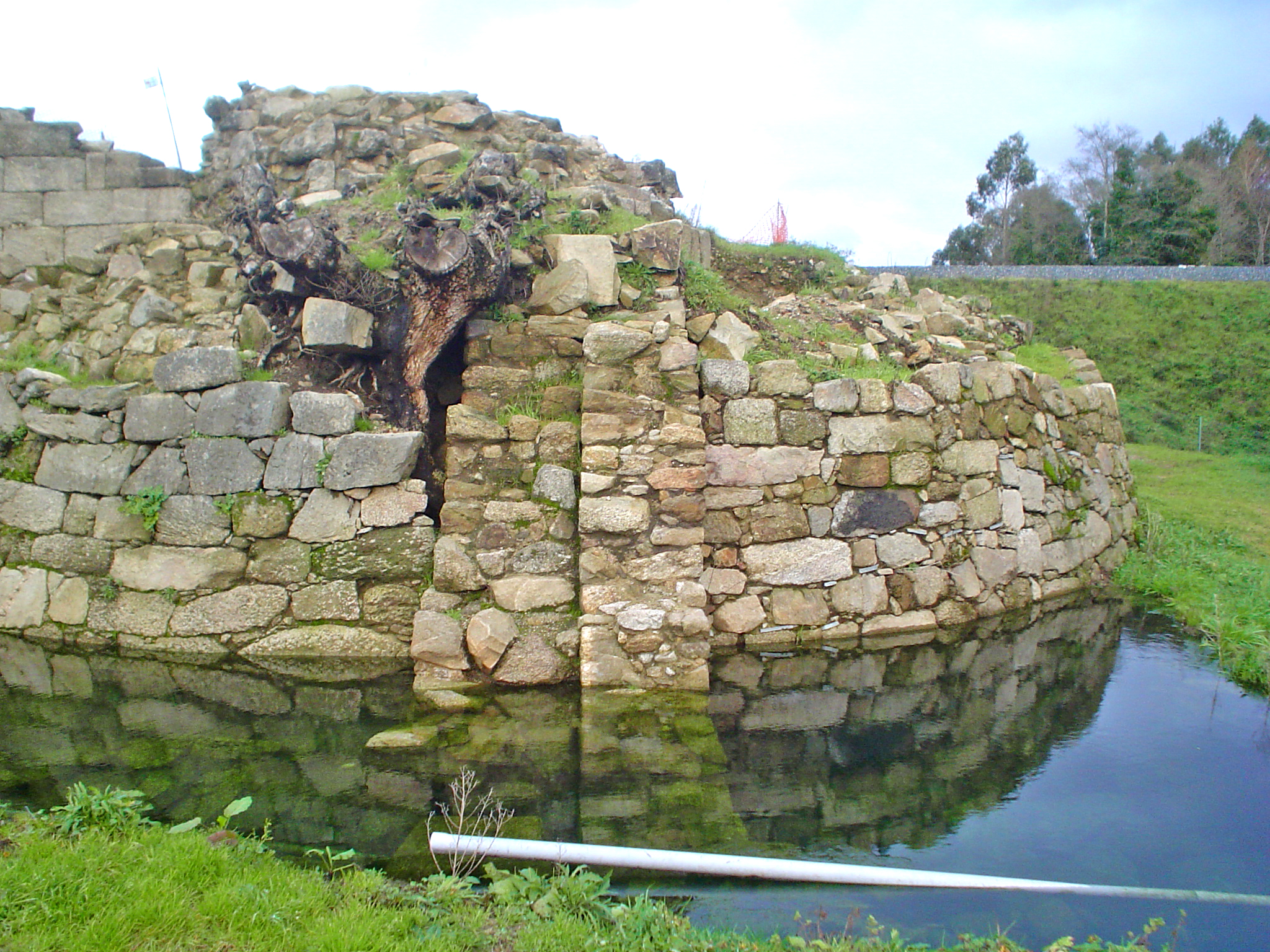 Castelo da Rocha forte. Conxo - Santiago. Torreón do sur